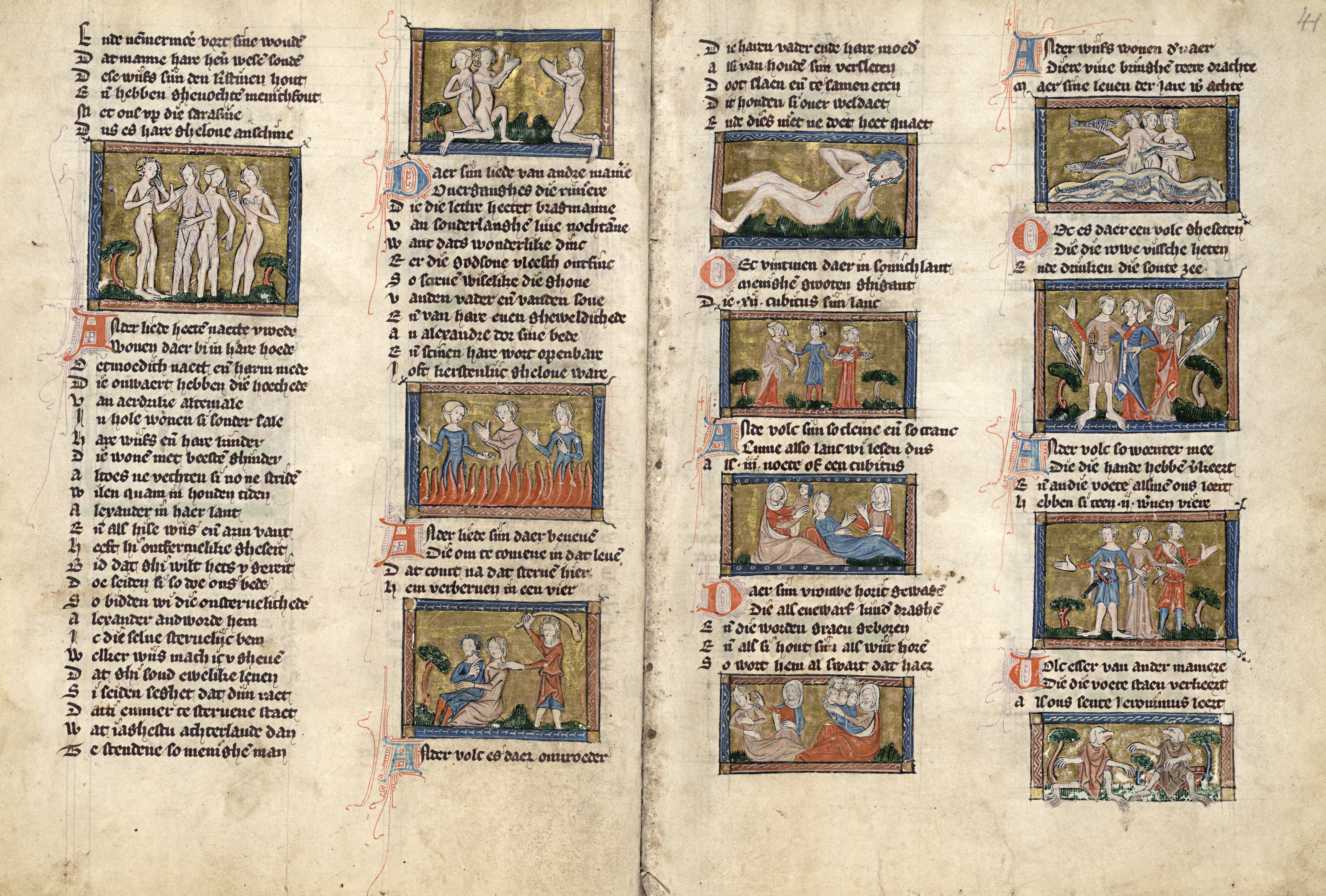 Lefthand side folio 040v and righthand side folio 041r from Der naturen bloeme (KB KA 16) by Jacob van Maerlant Miniatures on the left folio 040v Naked sages Brahmans People that burn their dead People that kill their old parents See these miniatures on the website of the KB: Naecte Vroede - Braghmannen - Volk dat zijn doden verbrandt - Volk dat zijn oude ouders dood slaat Miniatures on the right folio 041r Giant Dwarfs People that are born with grey hair People that bear quintuplets and live only eight years People that eat raw fish People with hands back to front People with feet back to front People with dog's heads See these miniatures on the website of the KB: Reus - Dwergen - Volk dat met grijze haren wordt geboren - Volk dat vijflingen baart en slechts acht jaar leeft - Volk dat rauwe vis eet - Volk met omgekeerde handen - Volk met omgekeerde voeten - Volk met hondenkoppen